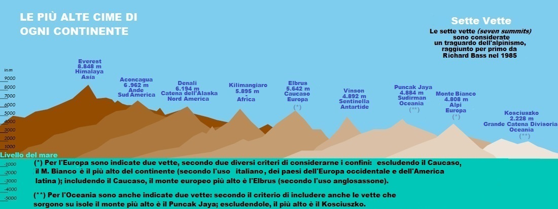 immagine che mette a confronto le sette vette più alte di ogni continente.